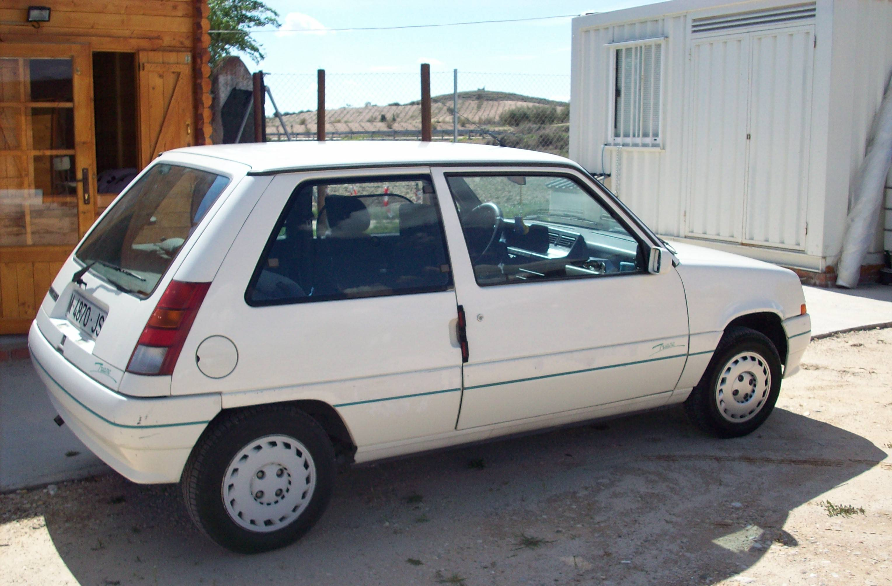 Ejemplar de renault supercinco TRIANA muy bien conservado